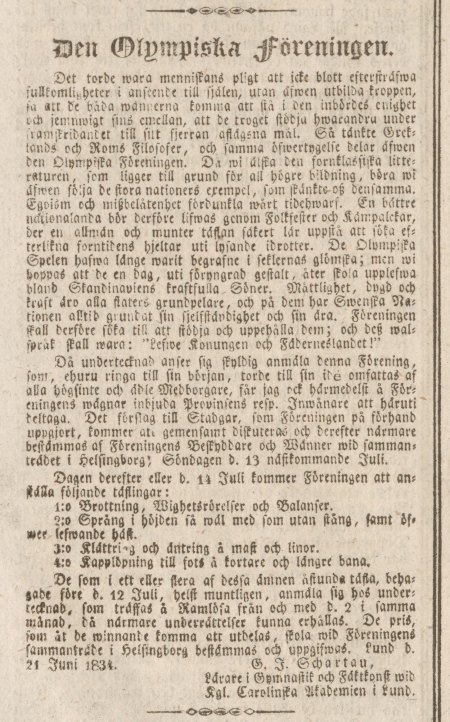 Upprop för Olympiska föreningen publicerad i Helsingborgs-Posten den 28 juni 1834.